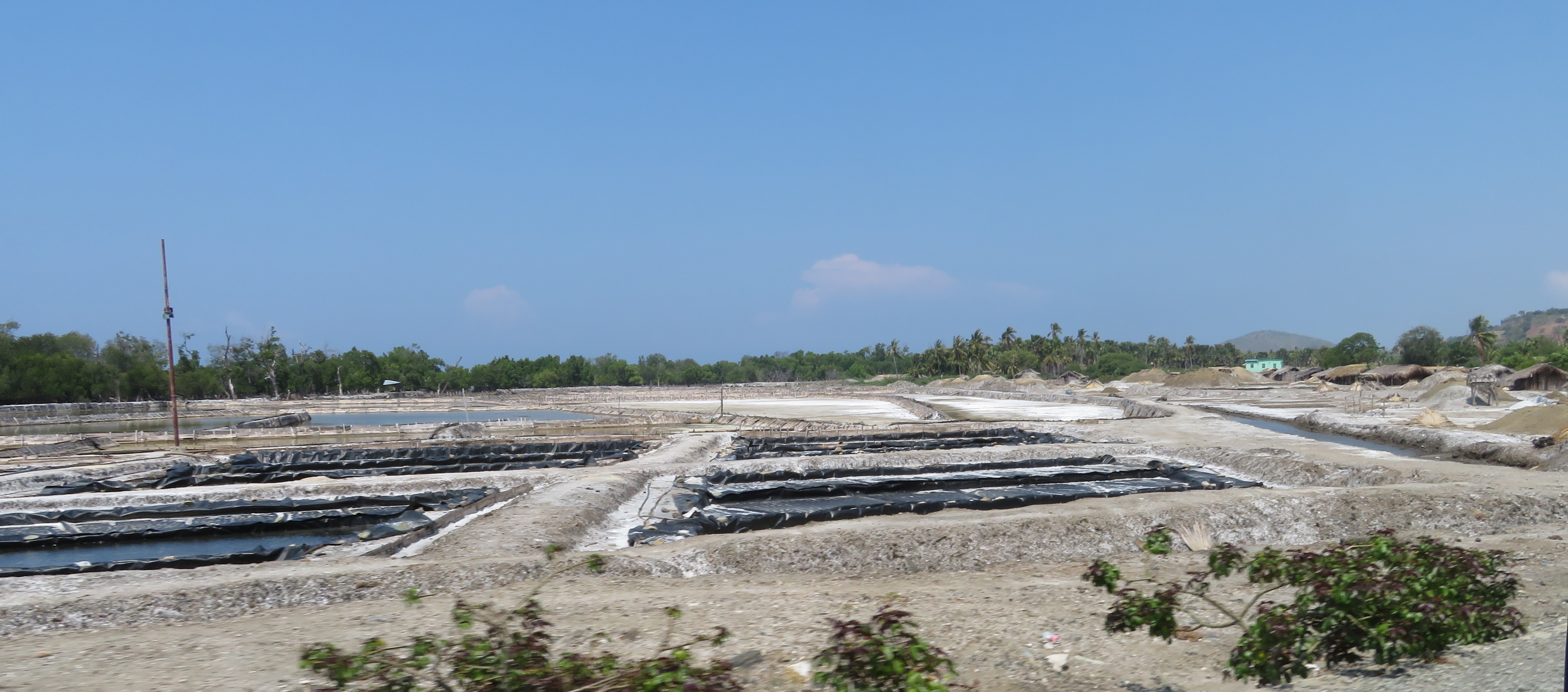 Salzgewinnung bei Liquiçá, Timor Leste